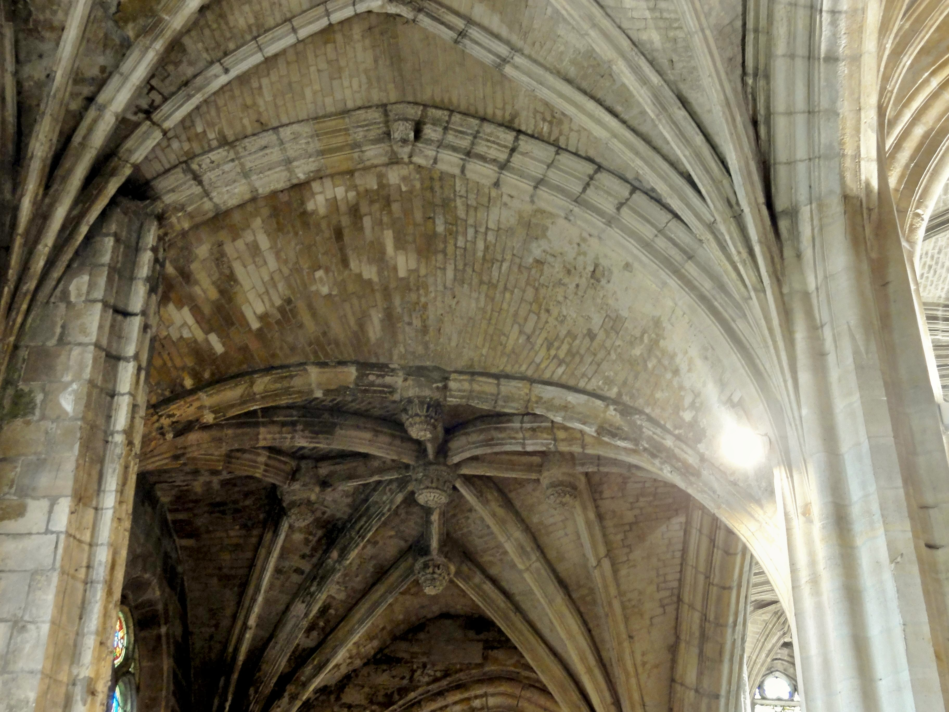 Collatéral nord, dernière travée, décrochement au début du déambulatoire, qui est voûté plus bas que les collatéraux afin de gagner de la place pour les fenêtres hautes de l'abside.